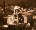 Церковь ап. Петра и Павла (Петрос-Погос) в Ереване, V в., снесена в 1931 г.